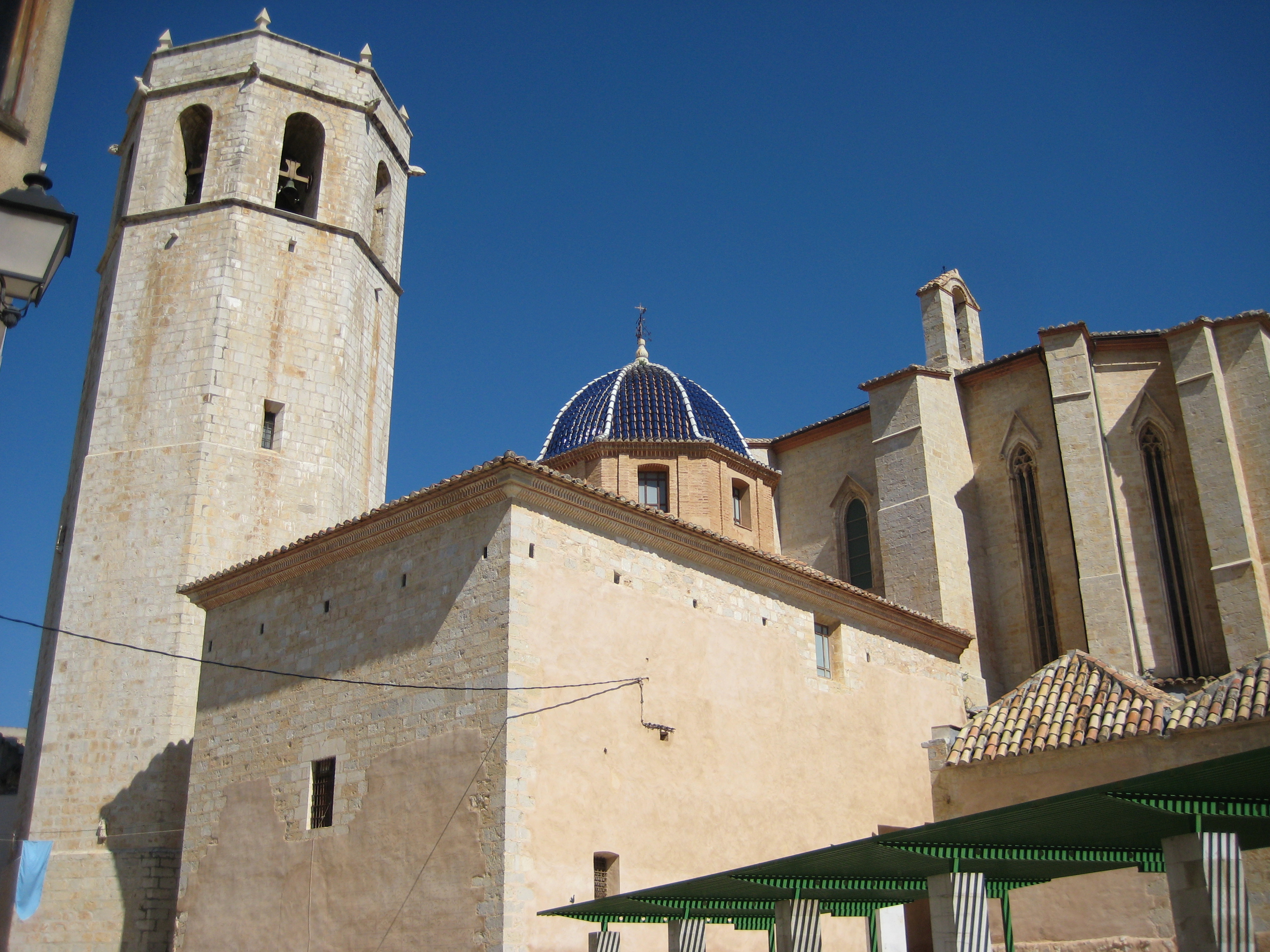 Absis amb finestral gòtic, cúpula de la capella de Sant Climent i campanar de l'església arxiprestal de Sant Mateu (Baix Maestrat)